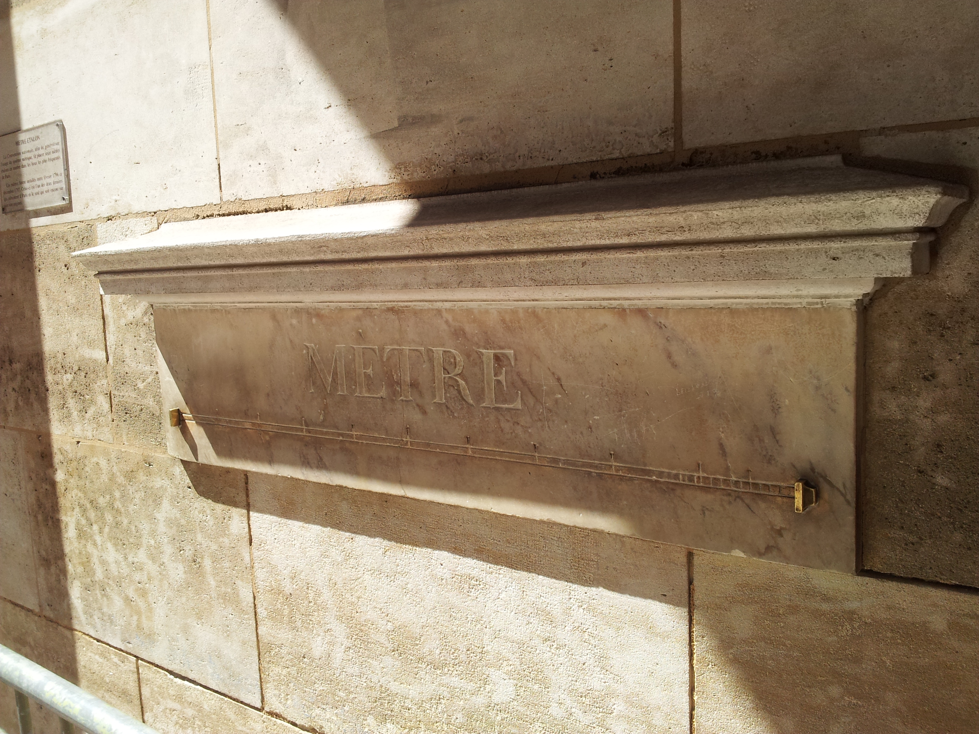 Av de seksten meter-eksemplarene som ble satt opp rundt omkring i Paris i 1796-1797 så er dette er det eneste gjenværende eksemplaret som fremdeles befinner seg på den plassen som den opprinnelig ble satt opp. Denne befinner seg på Rue de Vaugirard 36, som er like i nærheten av Luxembourgpalasset.